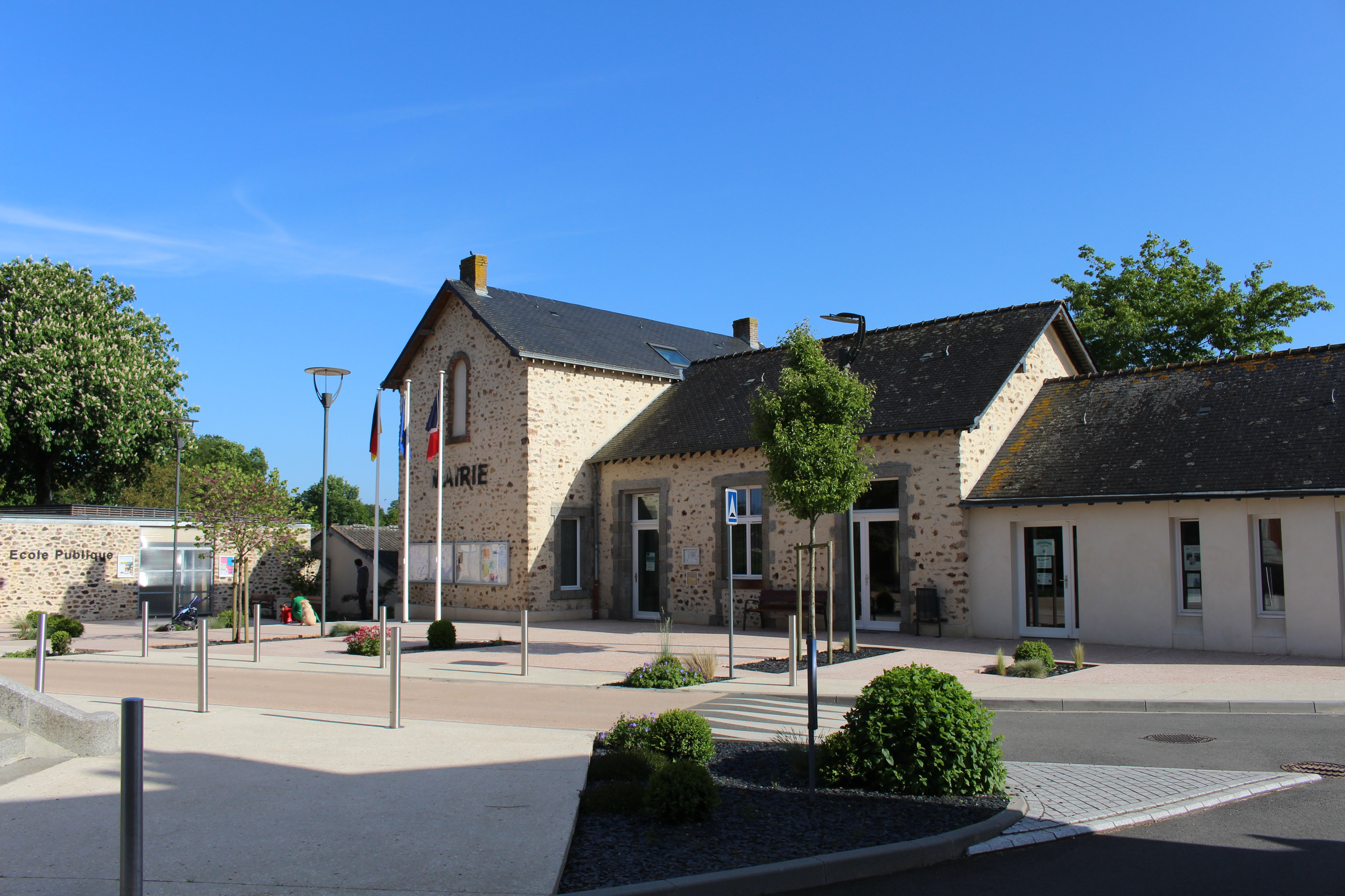 La Brûlatte, Mayenne